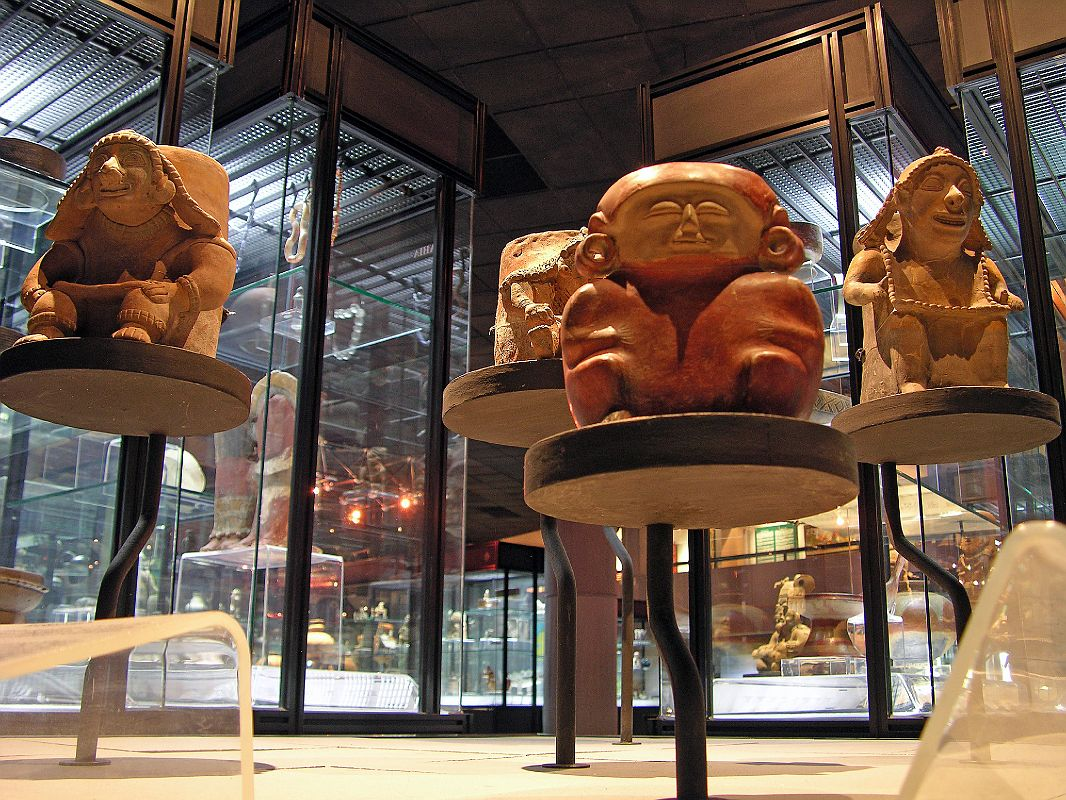 Sala de Arqueología